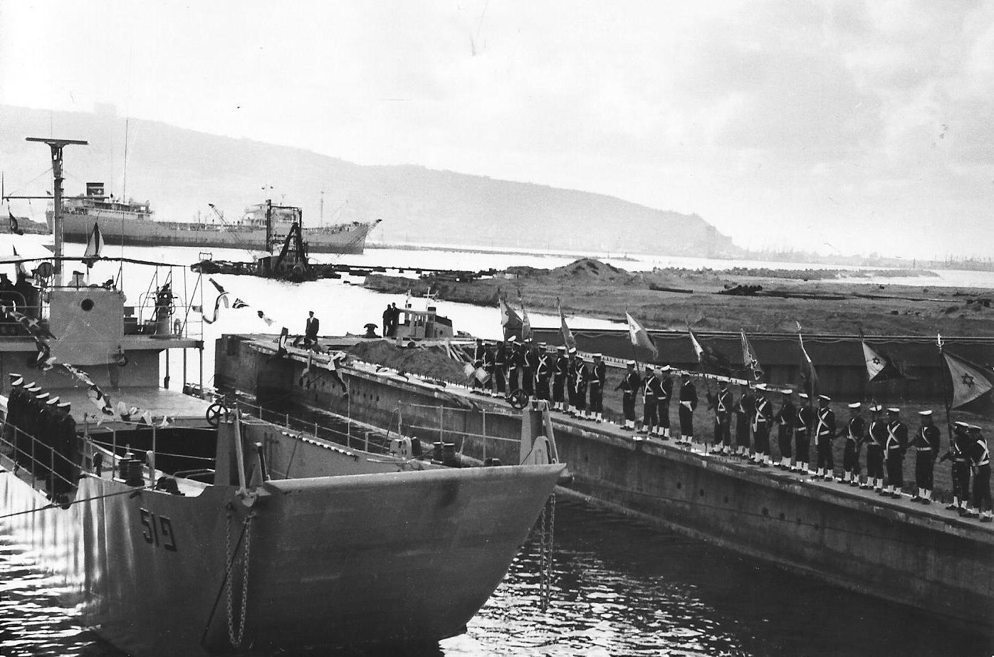 השקת אח"י עציון גבר פ-51 הנחתת הראשונה שנבנתה במספנות ישראל